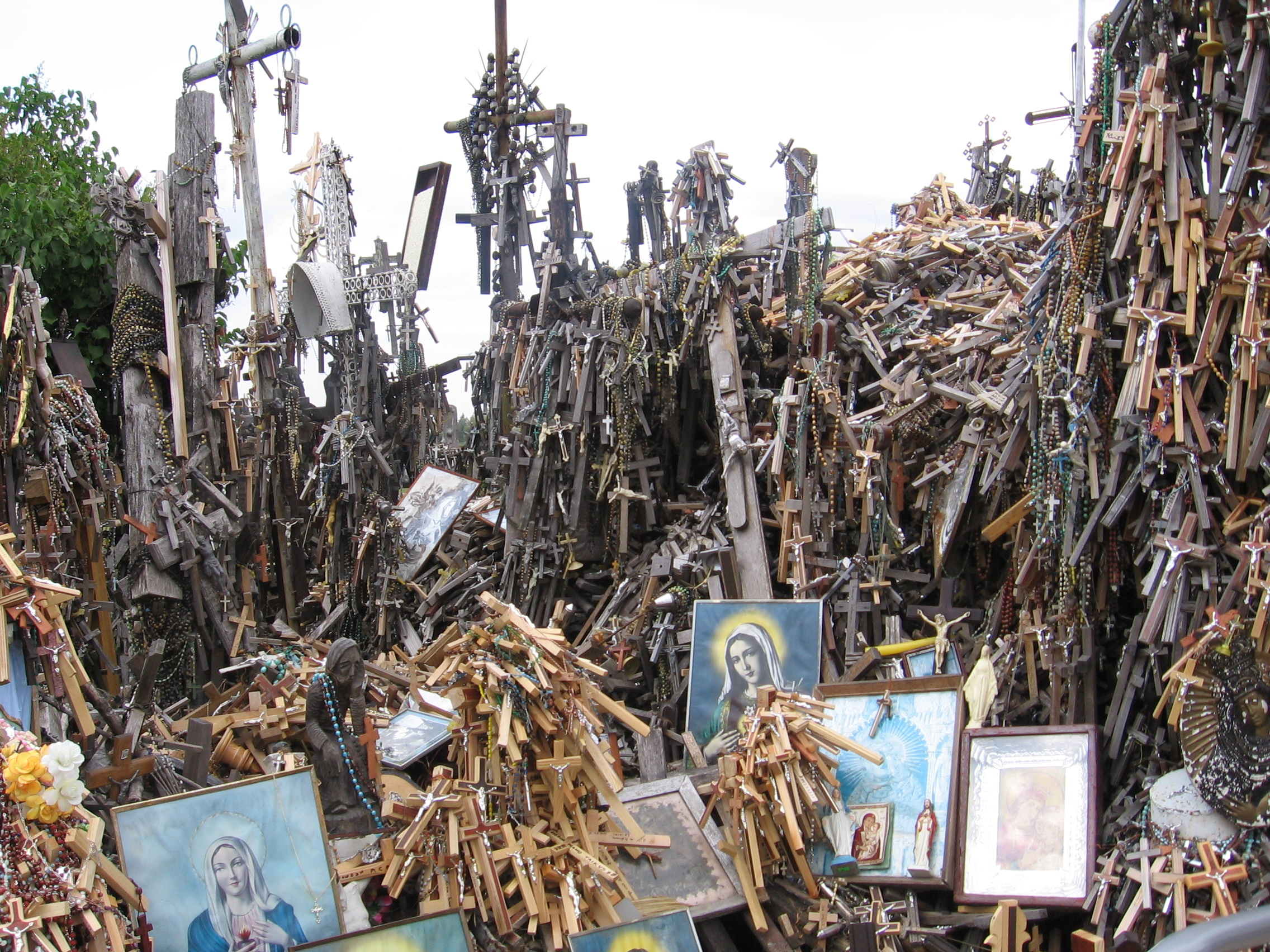 Kryžių kalnas